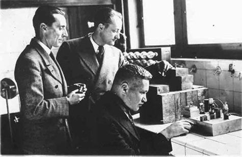 De gauche à droite: Frédéric Joliot, Hans Halban et Lew Korwarski au laboratoire.